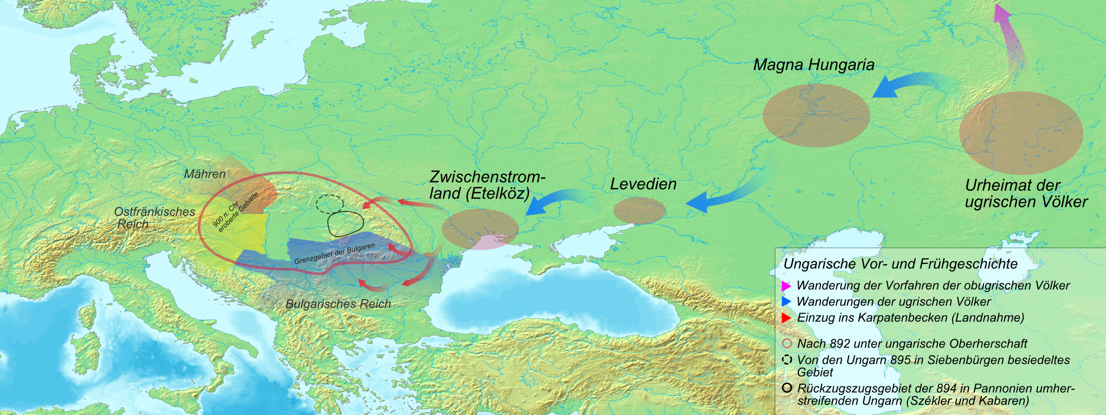 Geschichte Ungarns 1